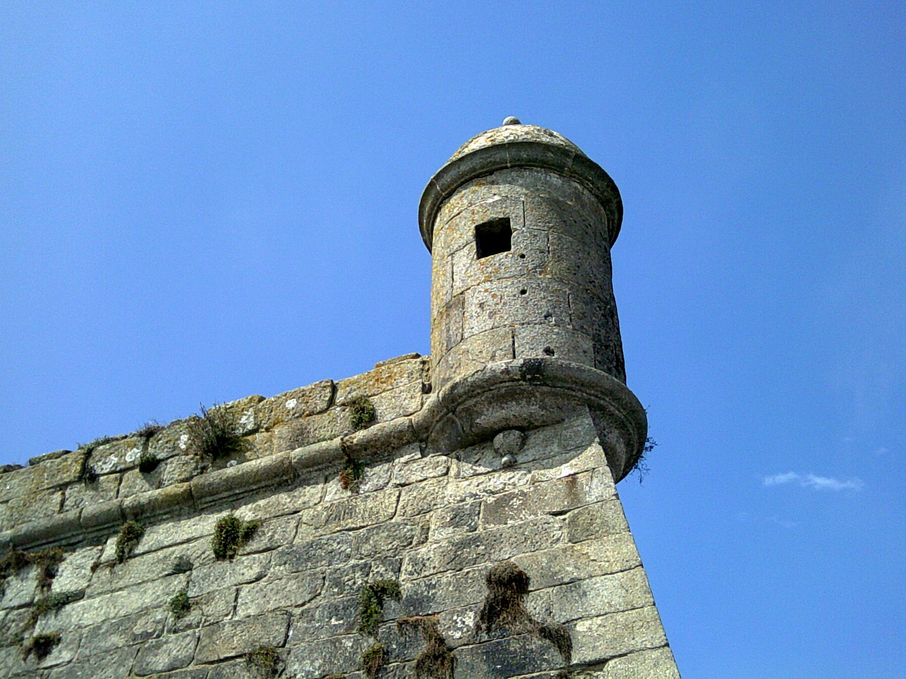 Forte de Santiago da Barra, freguesia de Monserrate, concelho e distrito de Viana do Castelo, Portugal: guarita.